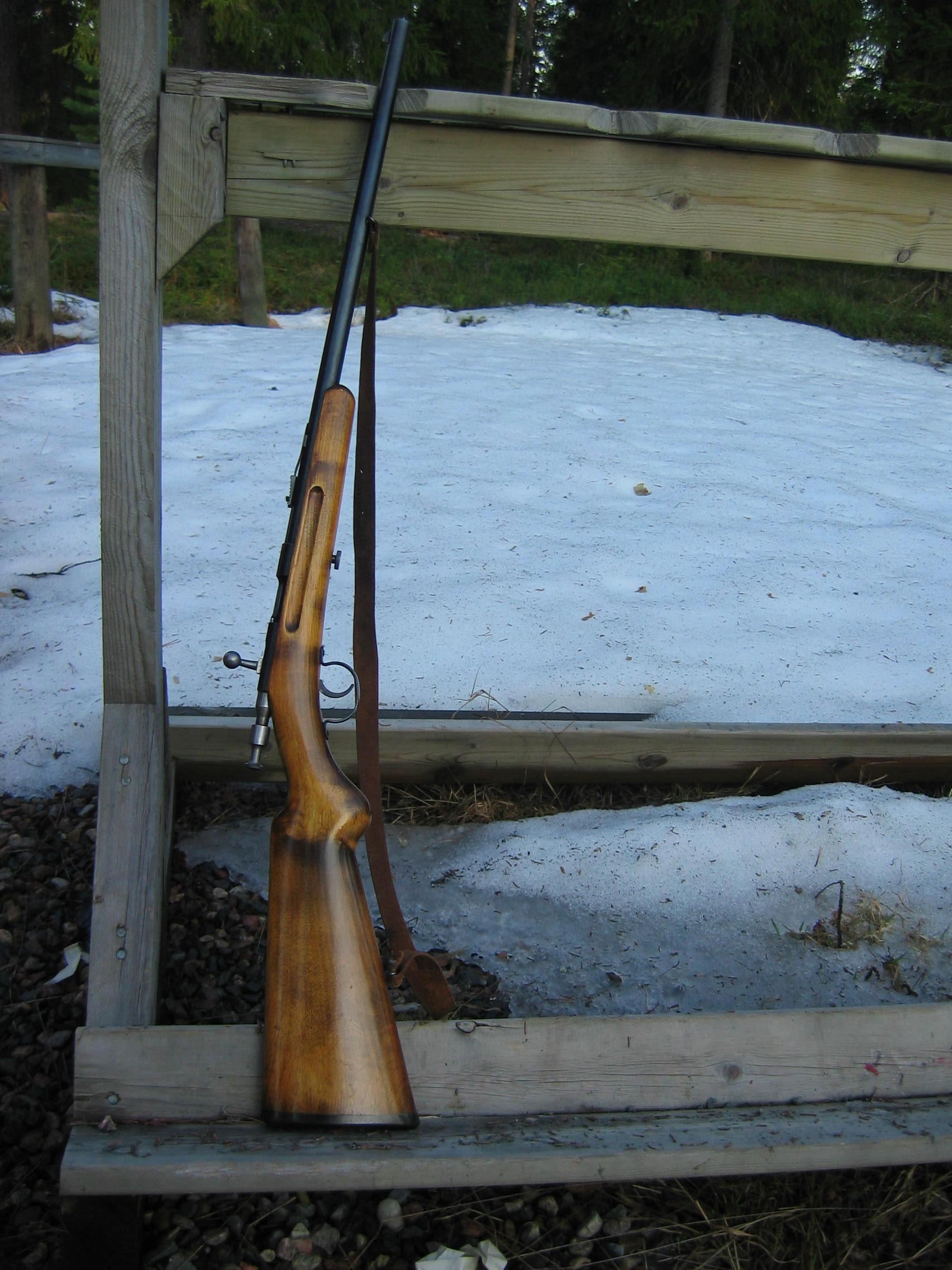 The Valmet made Finnish "Orava" (Squirrel) model m.49 smallbore .22LR rifle